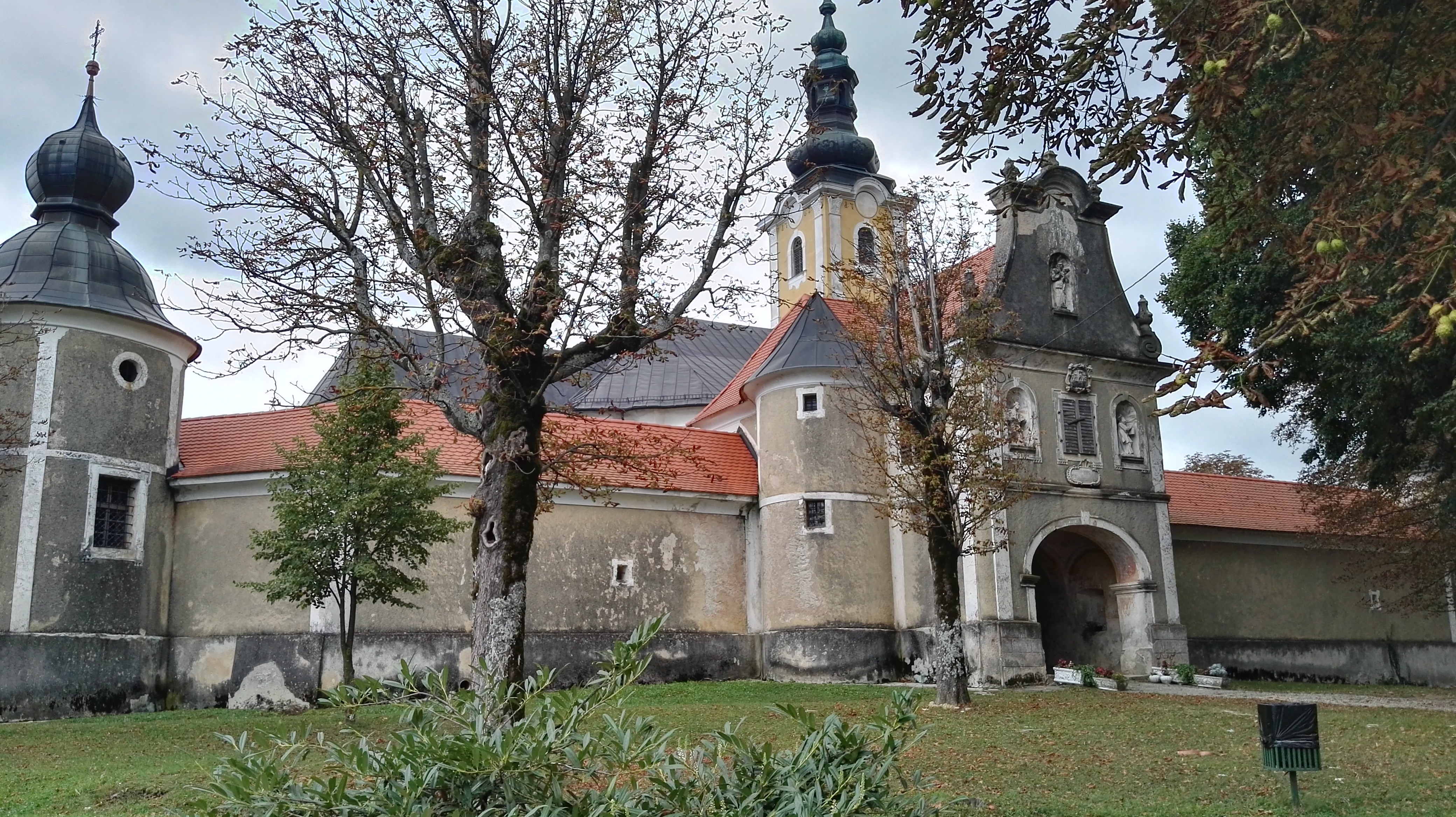 Svetište Majke Božje Jeruzalemske na Trškom Vrhu